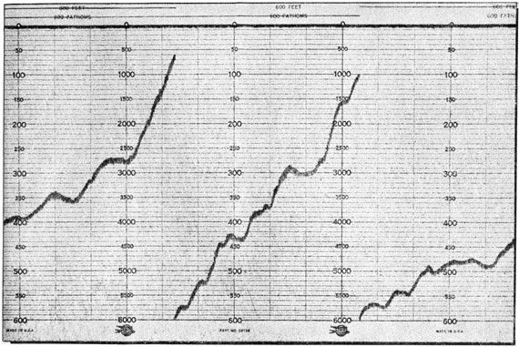 Лента самописца эхолота UQN-1. Для индикации одного из трёх режимов отображения, специальный стилус рисует в верхней части ленты горизонтальные линии, которые подчёркивают обозначения используемых в данный момент режимов. Если подсёркнут режим «600 feet», значит отображение идёт в режиме 0-600 футов, если подчёркнуто «600 fathoms», значит режим 0-600 морских саженей. Если подчёркнуты оба, значит режим 0-6000 морских саженей. На рисунке левая часть линии самописца показывает уменьшение глубины с 4000 до 600 морских саженей. Далее следует автоматическое переключение в режим 0-600 саженей (средняя часть линии), и глубина уменьшается с 600 до 100 саженей (т.е. до 600 футов). Затем следует переключение в режим 0-600 футов (правая часть линии) и отображается ход глубин от 600 до 430 футов.